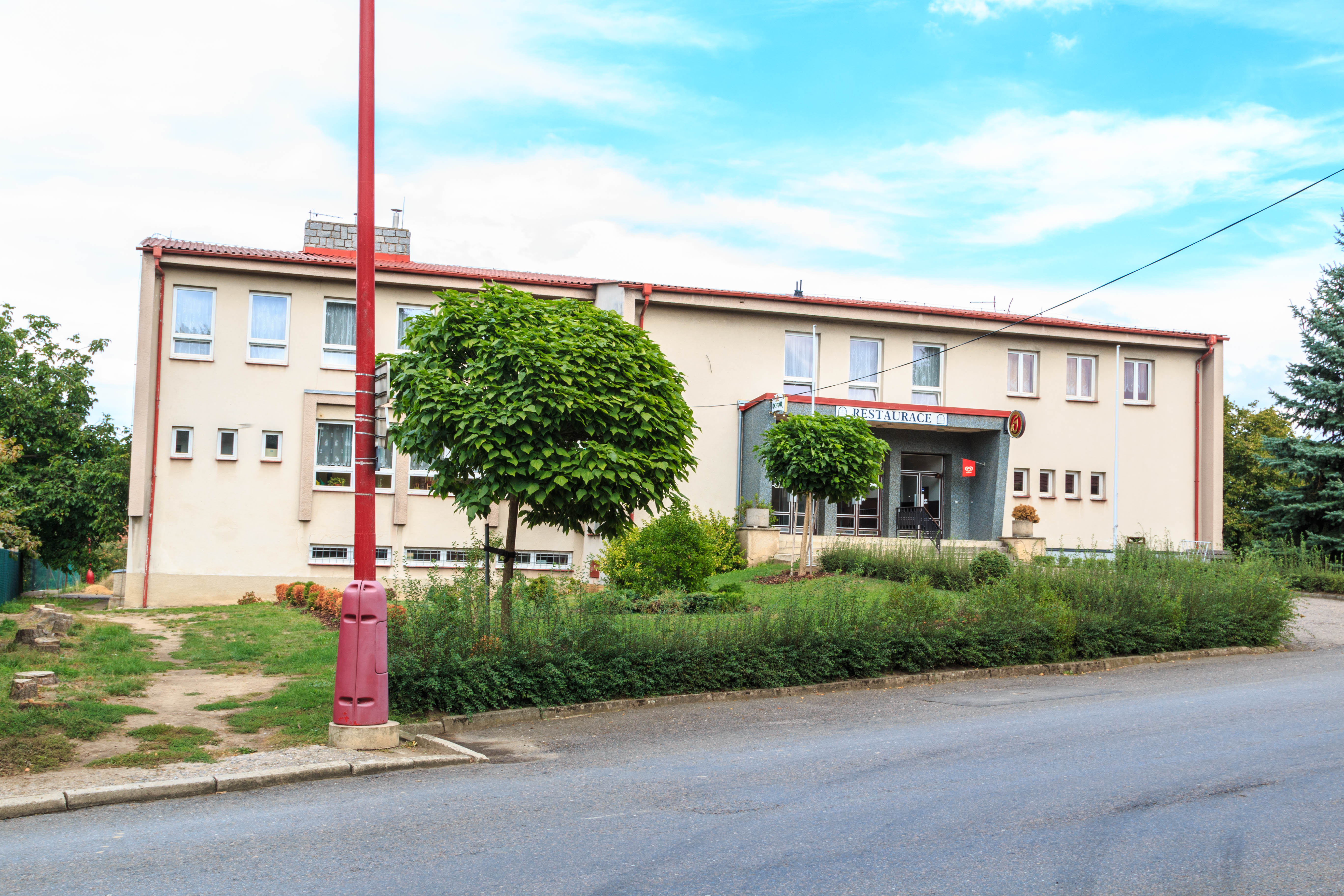 Slepotice obecní úřad